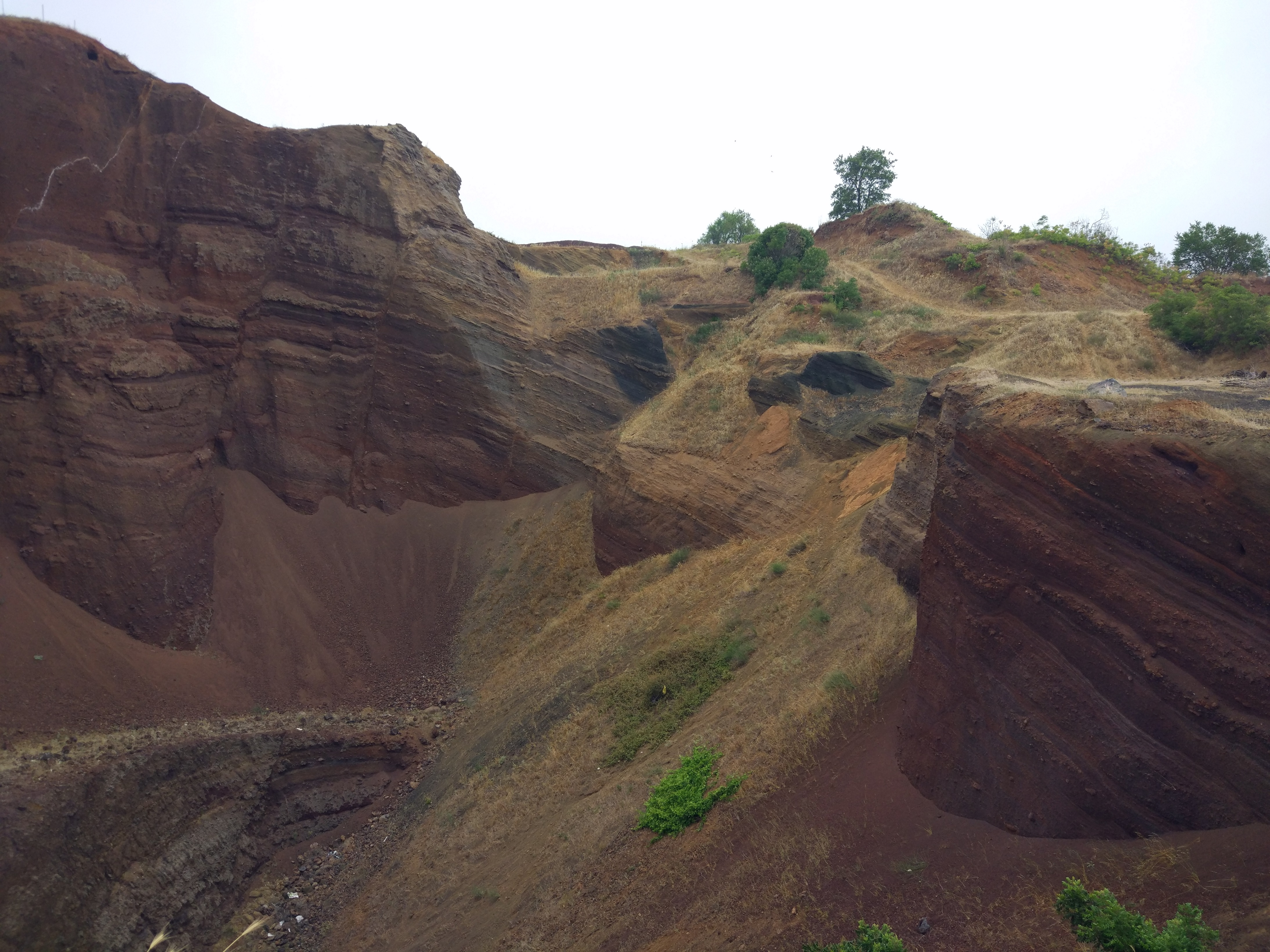 מחצבה לא פעילה בחלק הדרומי של הר אודם